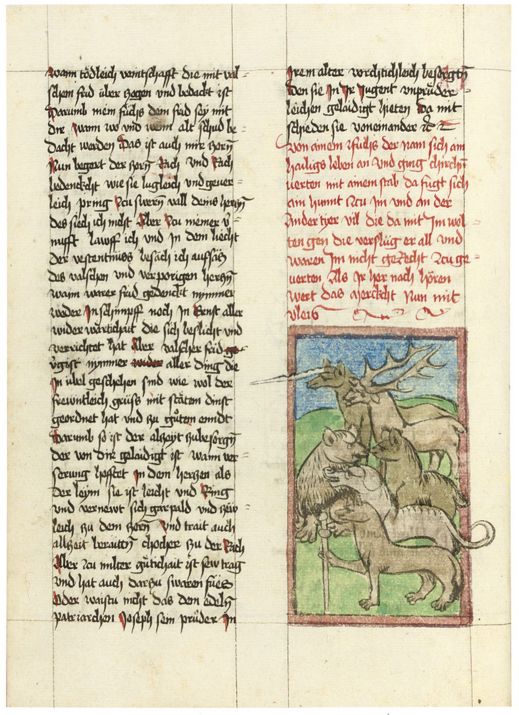 ULRICH VON POTTENSTEIN (c.1360-1417): Das Buch der natürlichen Weisheit, Christie's Sale 7590 Lot 45 (2008)